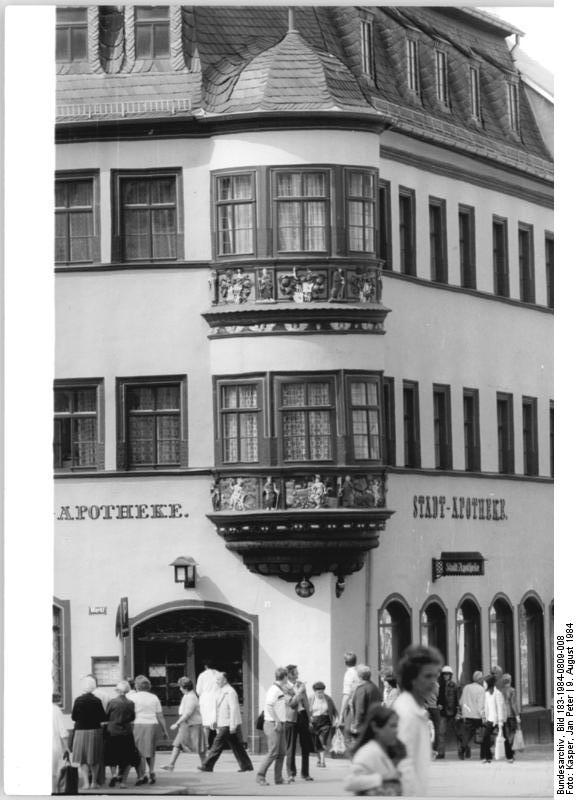 Gera, Stadtapotheke ADN-ZB Kasper 9.8.84 pe. Gera: Ein architektonisches Kleinod im Zentrum der thüringischen Bezirksstadt Gera ist das im 16. Jahrhundert errichtete Gebäude der Stadtapotheke. Der halbrunde Renaissanceerker an der Hausecke stammt laut Inschrift aus dem Jahre 1606. Die Fensterbrüstungen sind mit Wappentafeln und Reliefplatten, die die vier Jahreszeiten darstellen, verziert. Erst seit 1847 wird das Haus als Stadtapotheke genutzt. Vor fünf Jahren unterzogen Bauleute und Restauratoren das Gebäude einer Schönheitskur. (siehe 9 und 10 N)